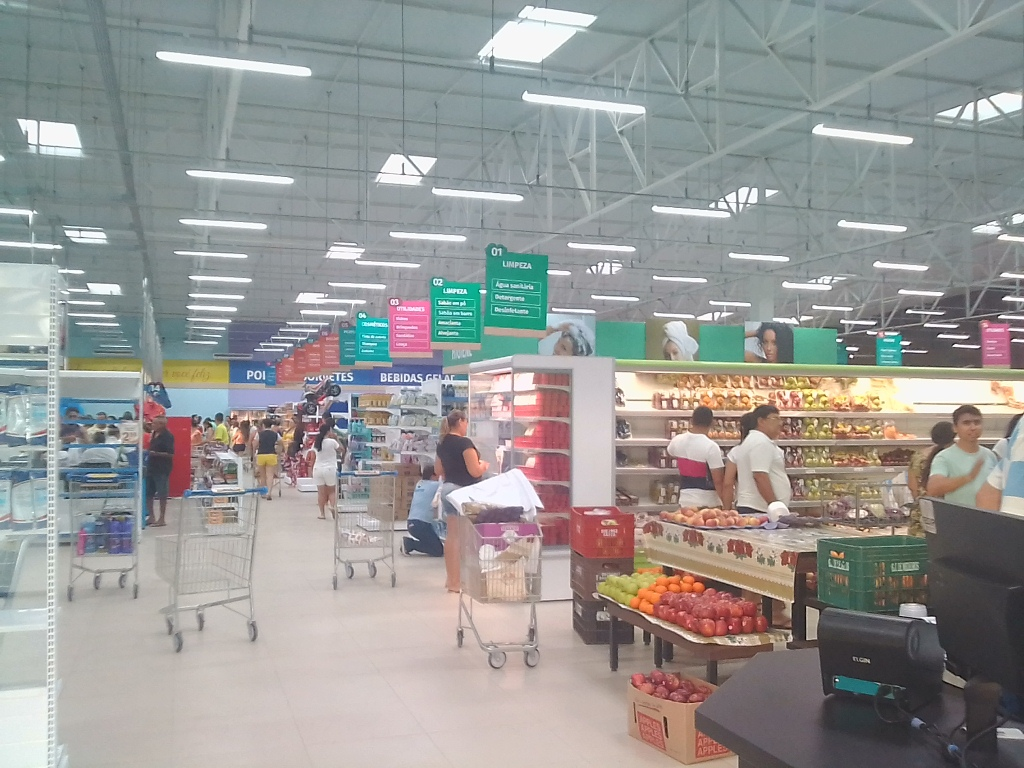 Estabelecimento do terceiro setor da economia em Caicó (RN), Brasil.